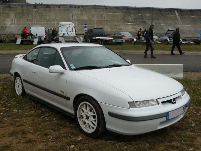 Français cadien: Montlhery Avril 2012